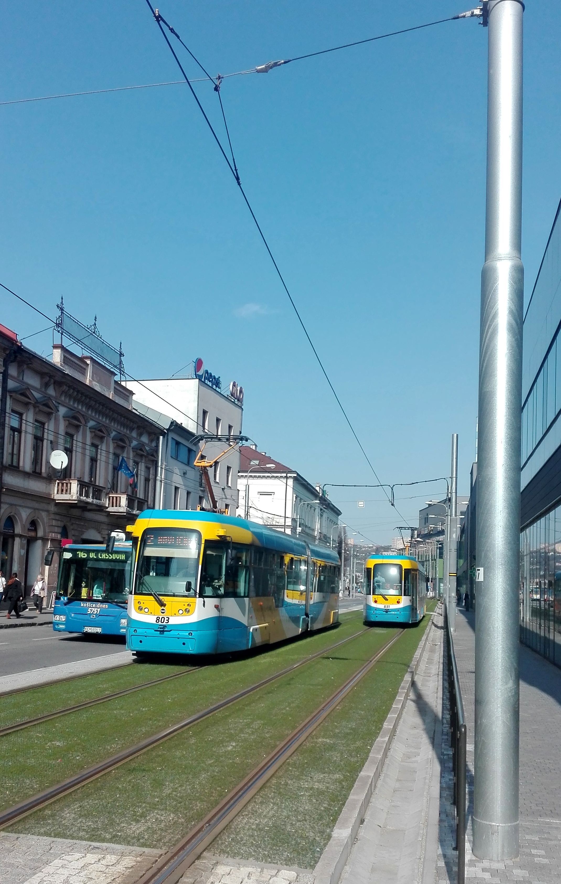 Električky Vario LF2+ na Námestí osloboditeľov, Košice 2016